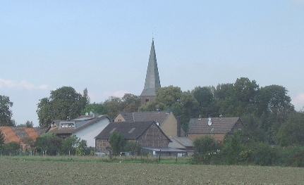 Kirche St. Medardus Auenheim by Tobias Sckerl